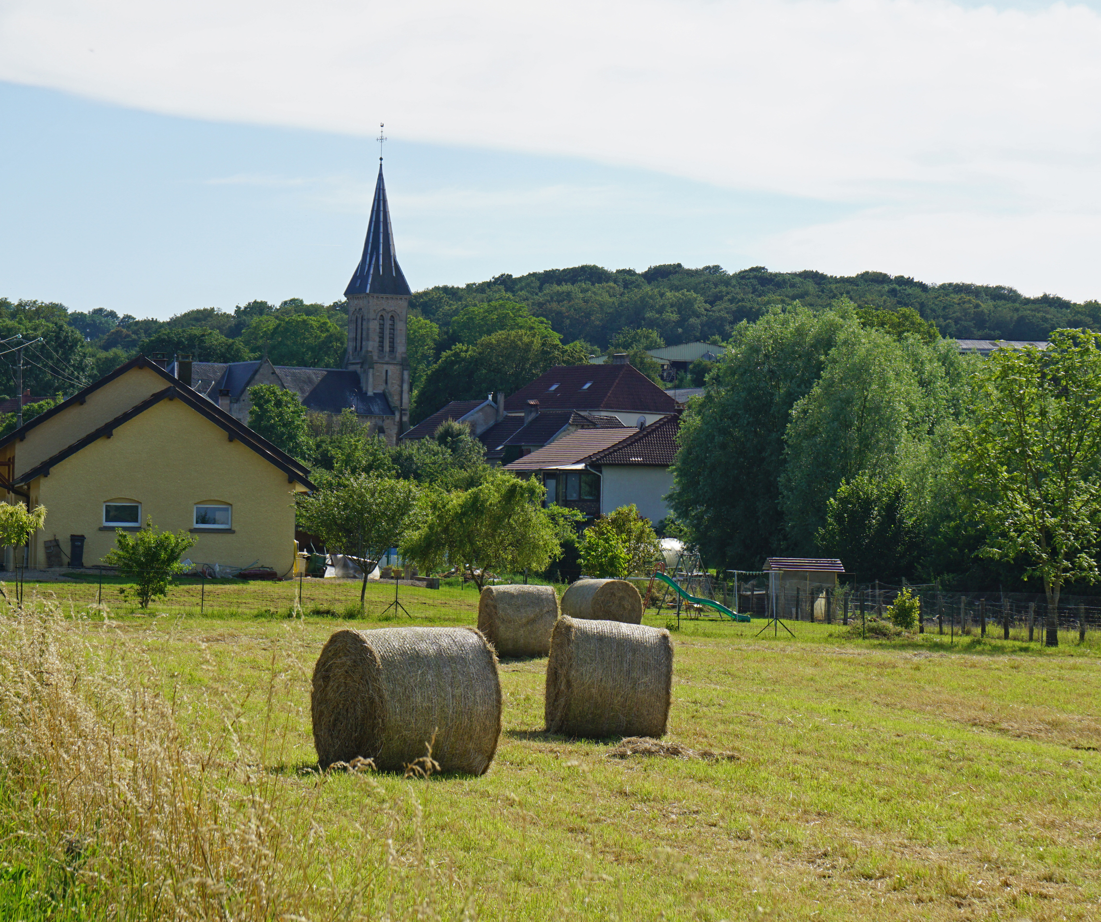 Liévans.